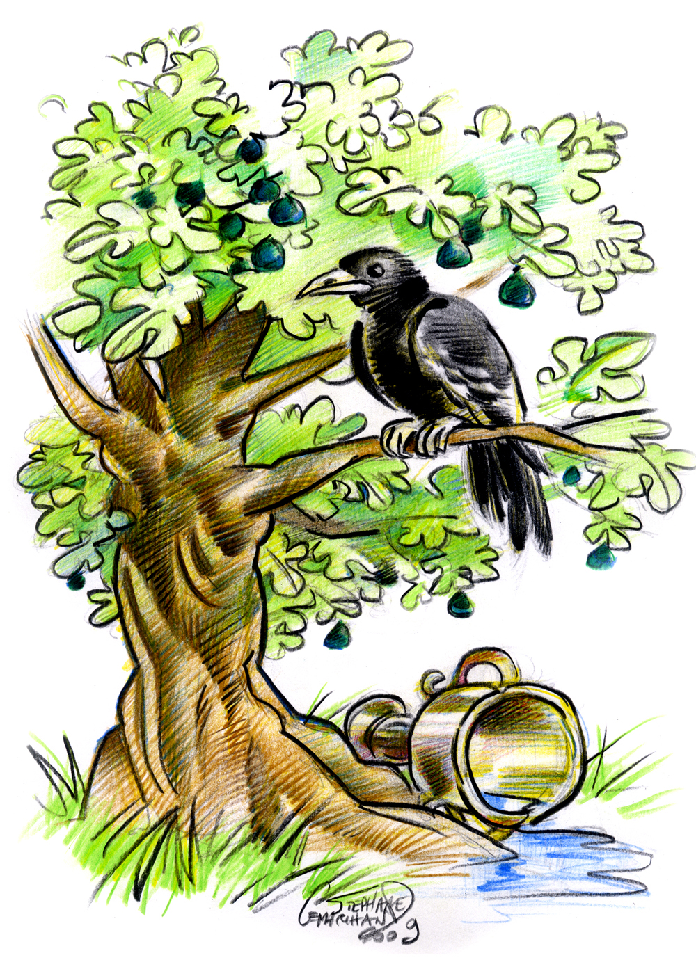 Korvo en figarbo